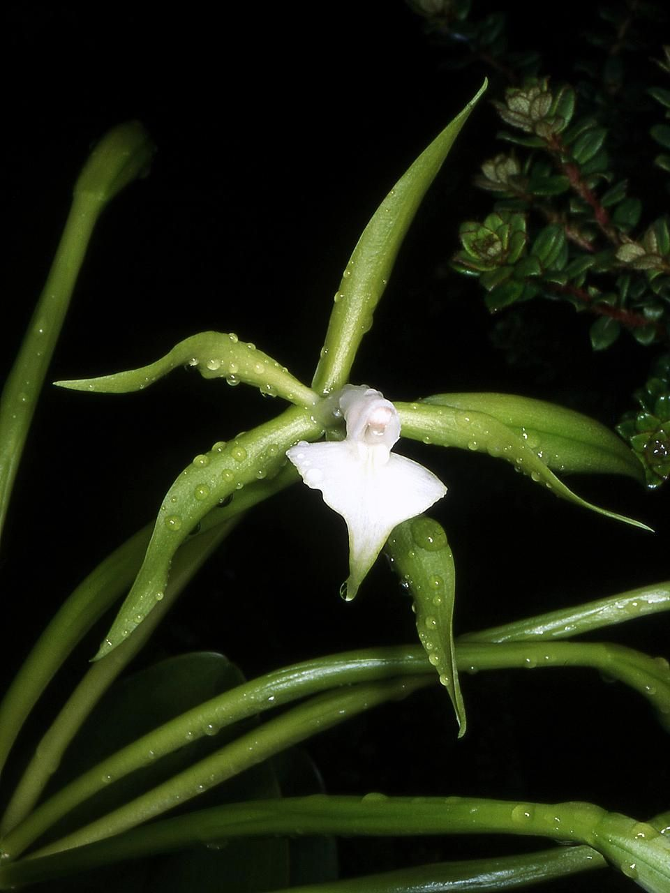 Epidendrum philocremnum